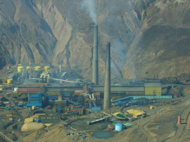 Fundición de cobre en mina El Teniente, Codelco Chile